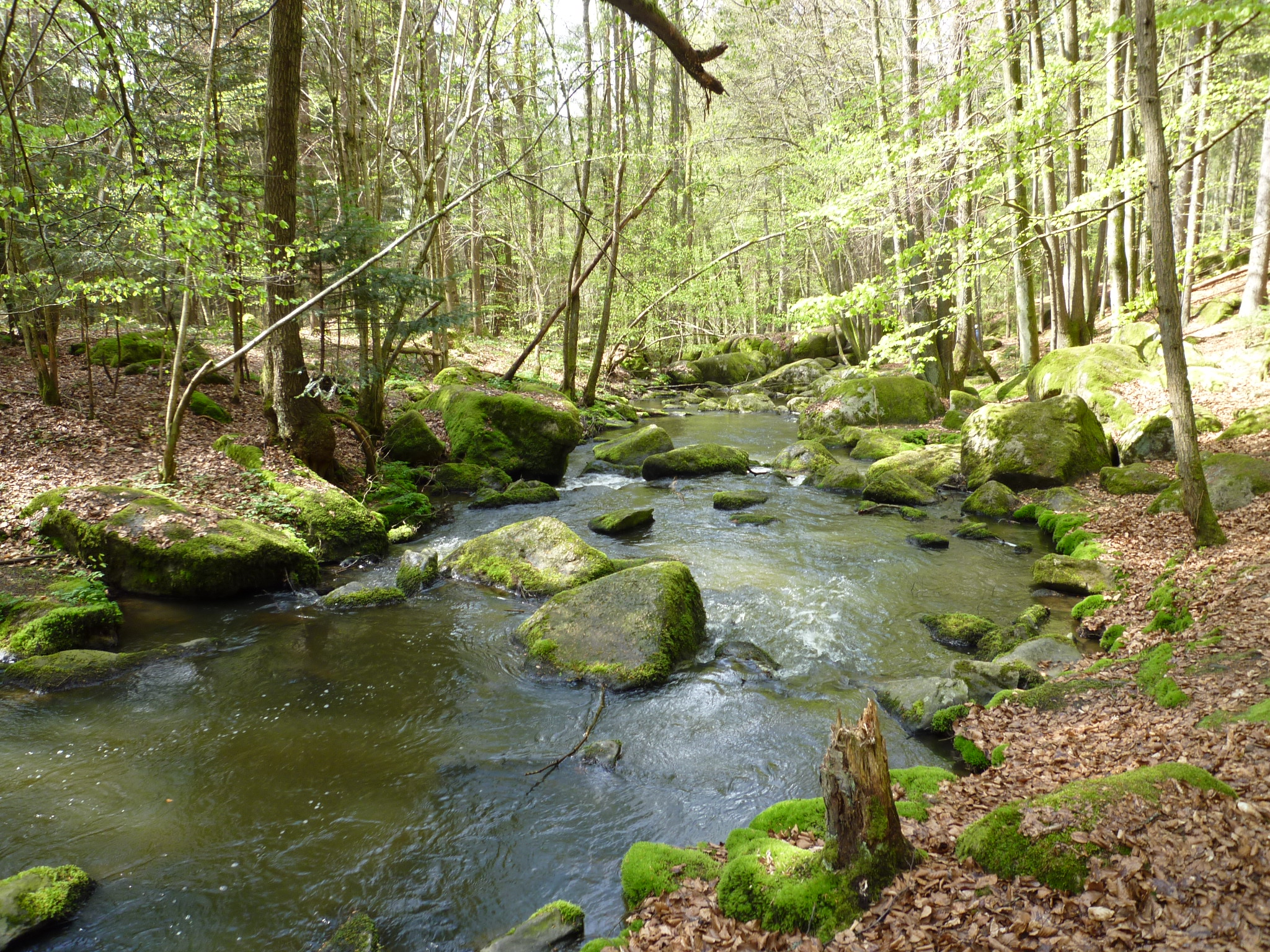 Das Naturschutzgebiet Hölle liegt zwischen den Ortschaften Postfelden und Brennberg in der Oberpfalz, Landkreis Regensburg.